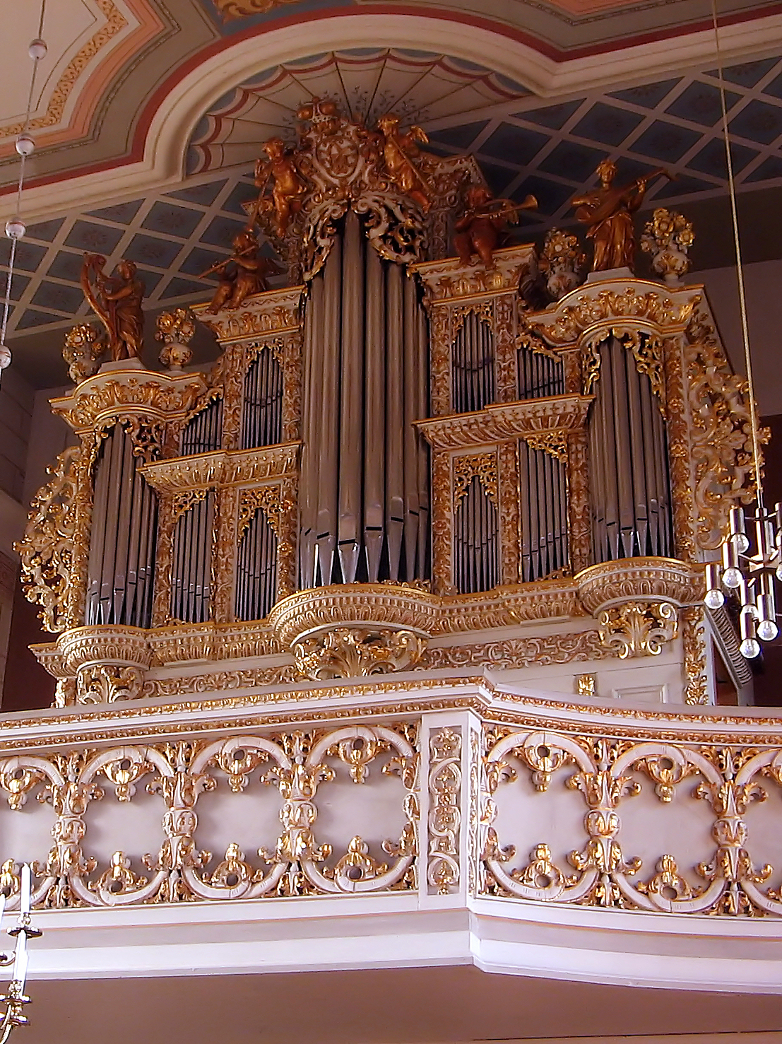 Barocke Kirchenorgel der Clauener Kirche